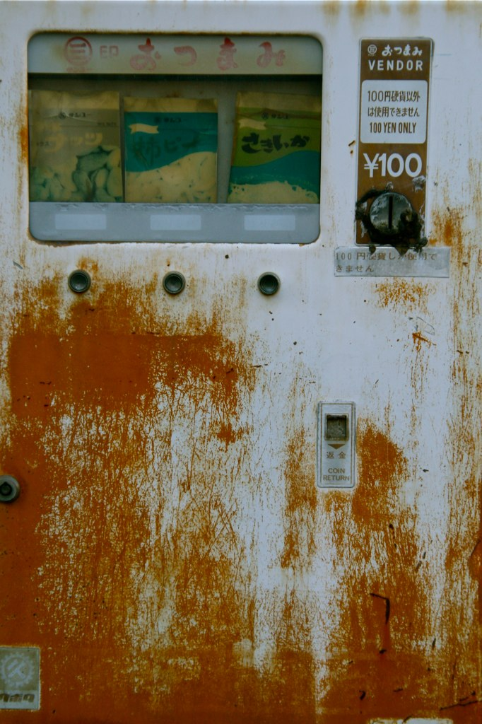 Asakusa photo walk ナッツ, 柿ピー, さきいか